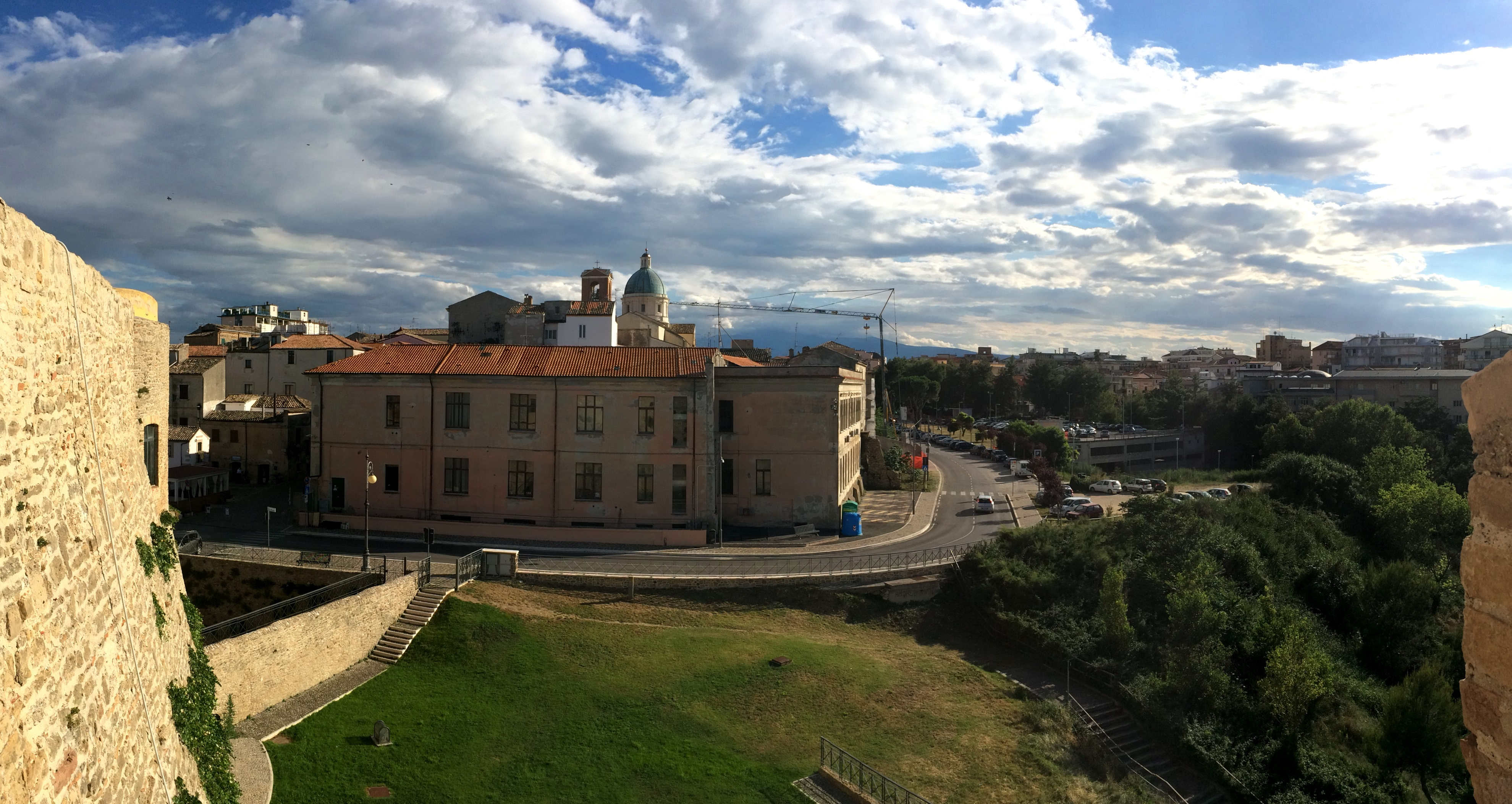 Veduta di Ortona, Chieti.